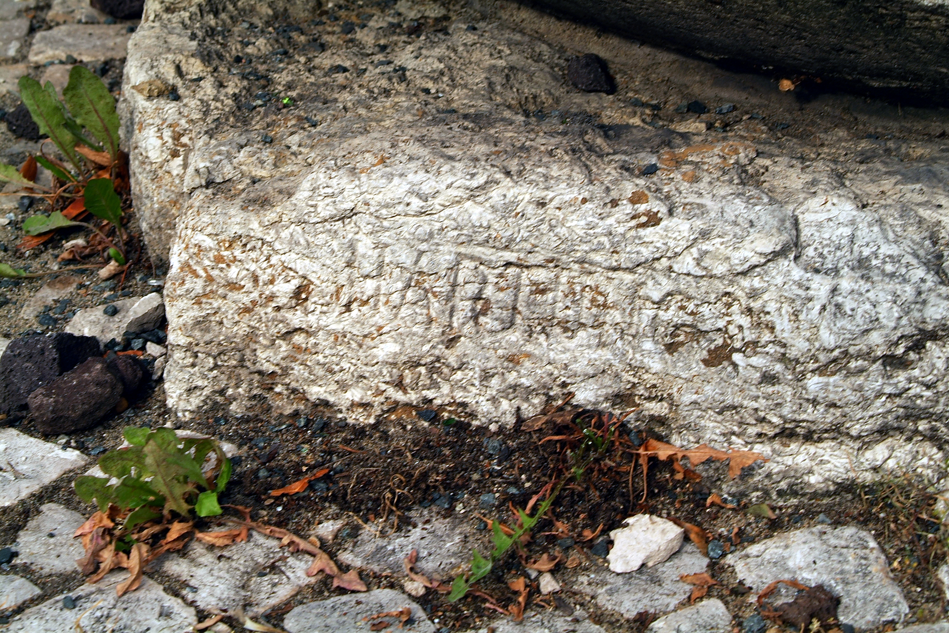 Signatur am Sockel der Plastik Große Kugelform von Karl Hartung.